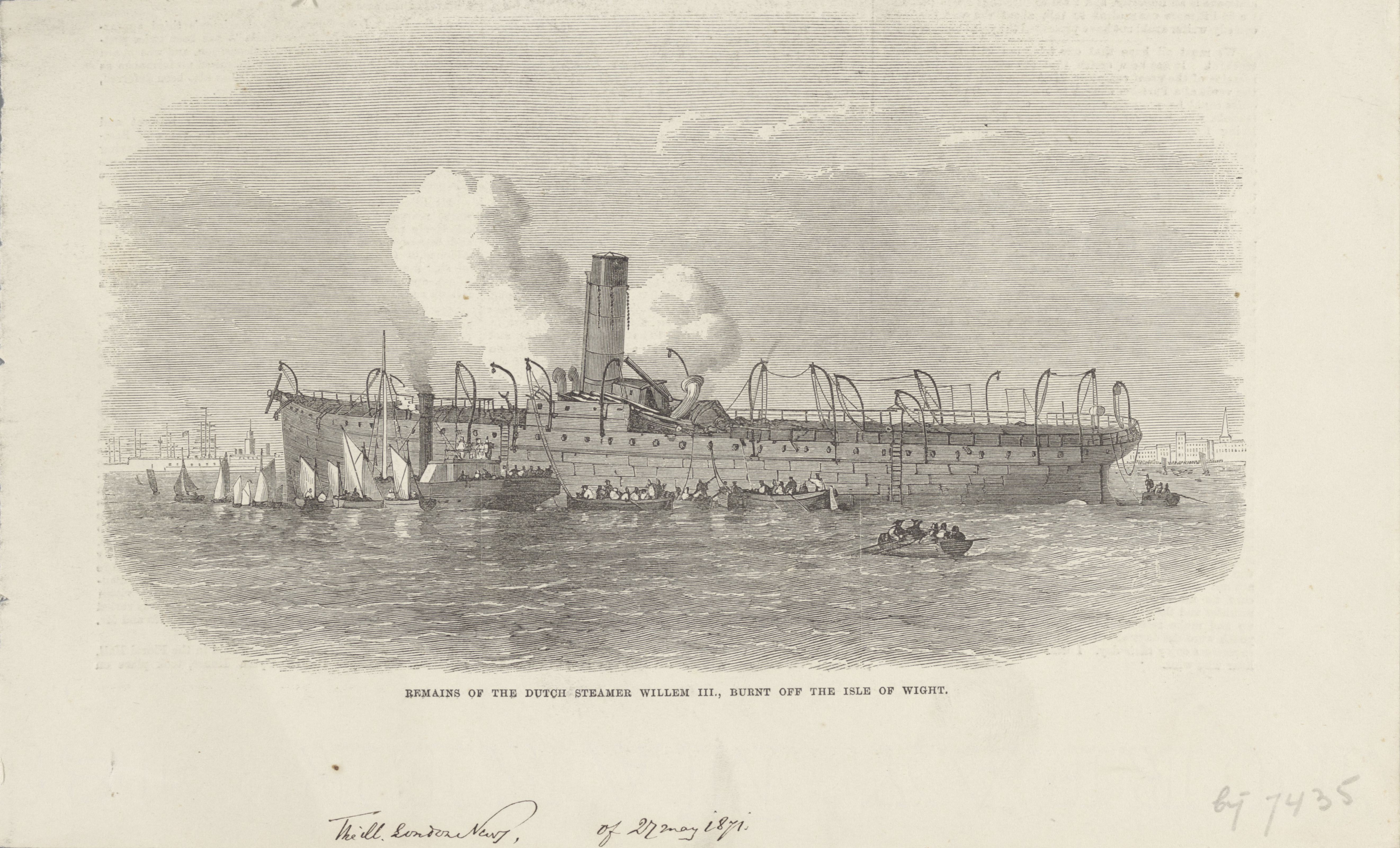 IdentificatieTitel(s): Stoomschip Willem III, na de brand van 1871Remains of the Dutch steamer Willem III., burnt off the Isle of Wight (titel op object)Objecttype: prent Objectnummer: RP-P-OB-89.222Catalogusreferentie: FMH 7435-bijOmschrijving: Het uitgebrande wrak van het schroefstoomschip Willem III, na de brand van 19 mei 1871. Rondom het nog smeulende schip varen vele kleine bootjes. Uitgeknipte illustratie bedrukt met tekst op achterzijde. Bij de illustratie ook een Nederlands krantenknipsel over de brand.VervaardigingVervaardiger: prentmaker: anoniemPlaats vervaardiging: EngelandDatering: 1871Fysieke kenmerken: houtgravureMateriaal: papier Techniek: houtgravureAfmetingen: blad: h 180 mm × b 292 mmToelichtingIllustratie genomen uit de Illustrated London News, 27 mei 1871.OnderwerpWat: ships (in general) (+ propulsion of vehicle, ship, etc. by steam)steamship, motorshipWanneer: 1871-05-19 - 1871-05-19Wie: Willem III (schip)Verwerving en rechtenVerwerving: aankoop 1881Copyright: Publiek domein